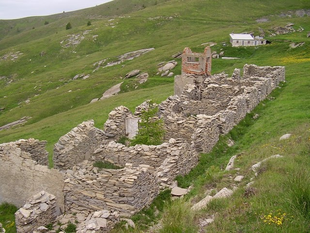 Resti dei Baraccamenti sul balcone di Marta